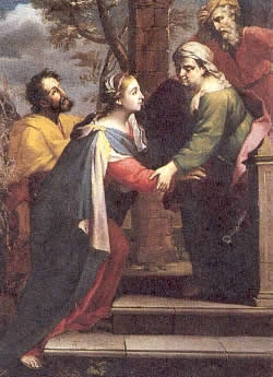 La visitazione